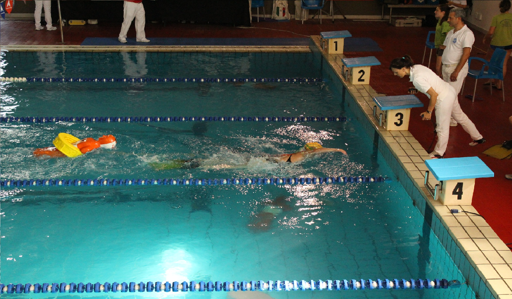 Un atleta che arriva conclude la gara con pinne, torpedo e manichino